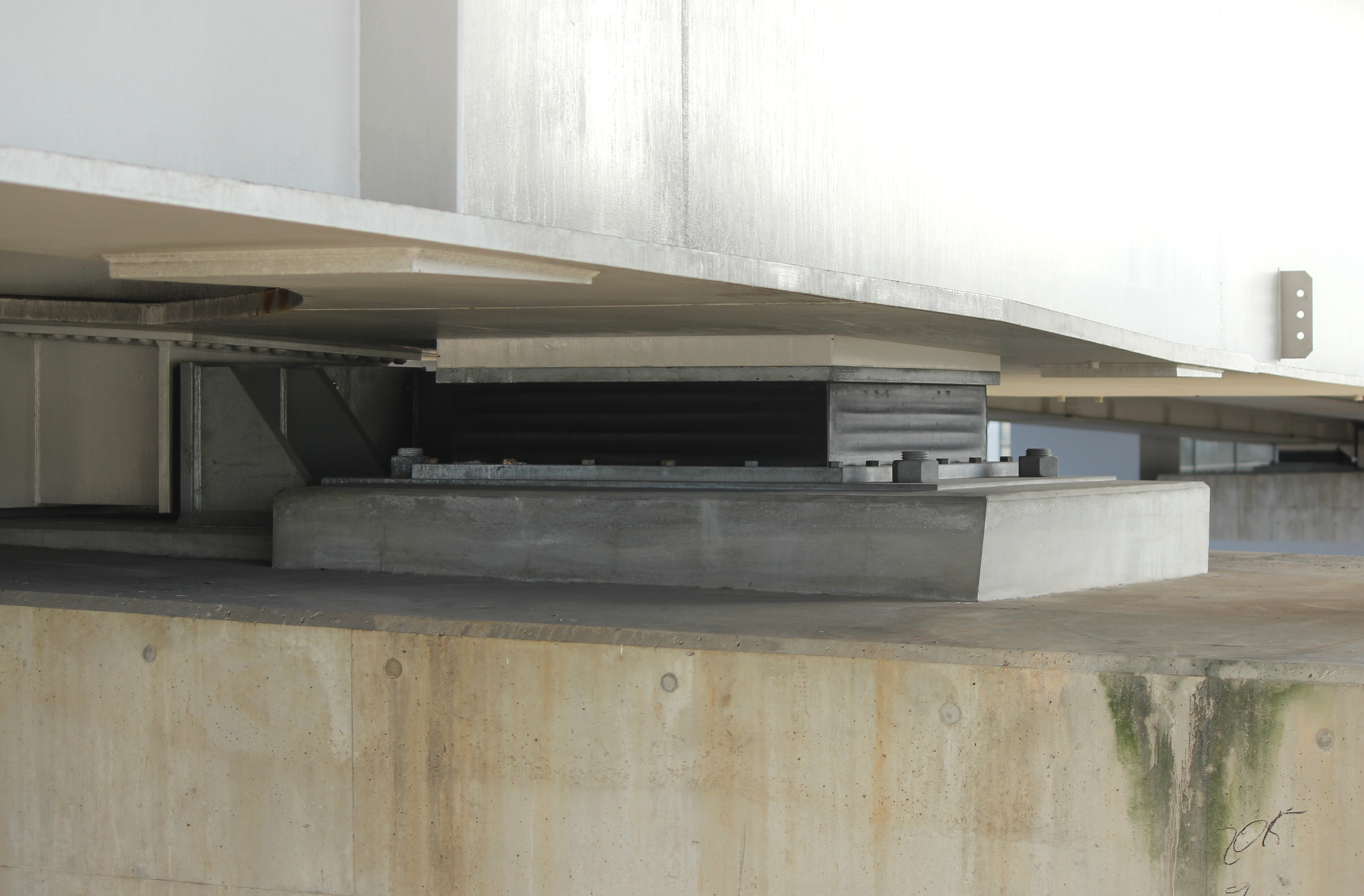 高架橋の支承